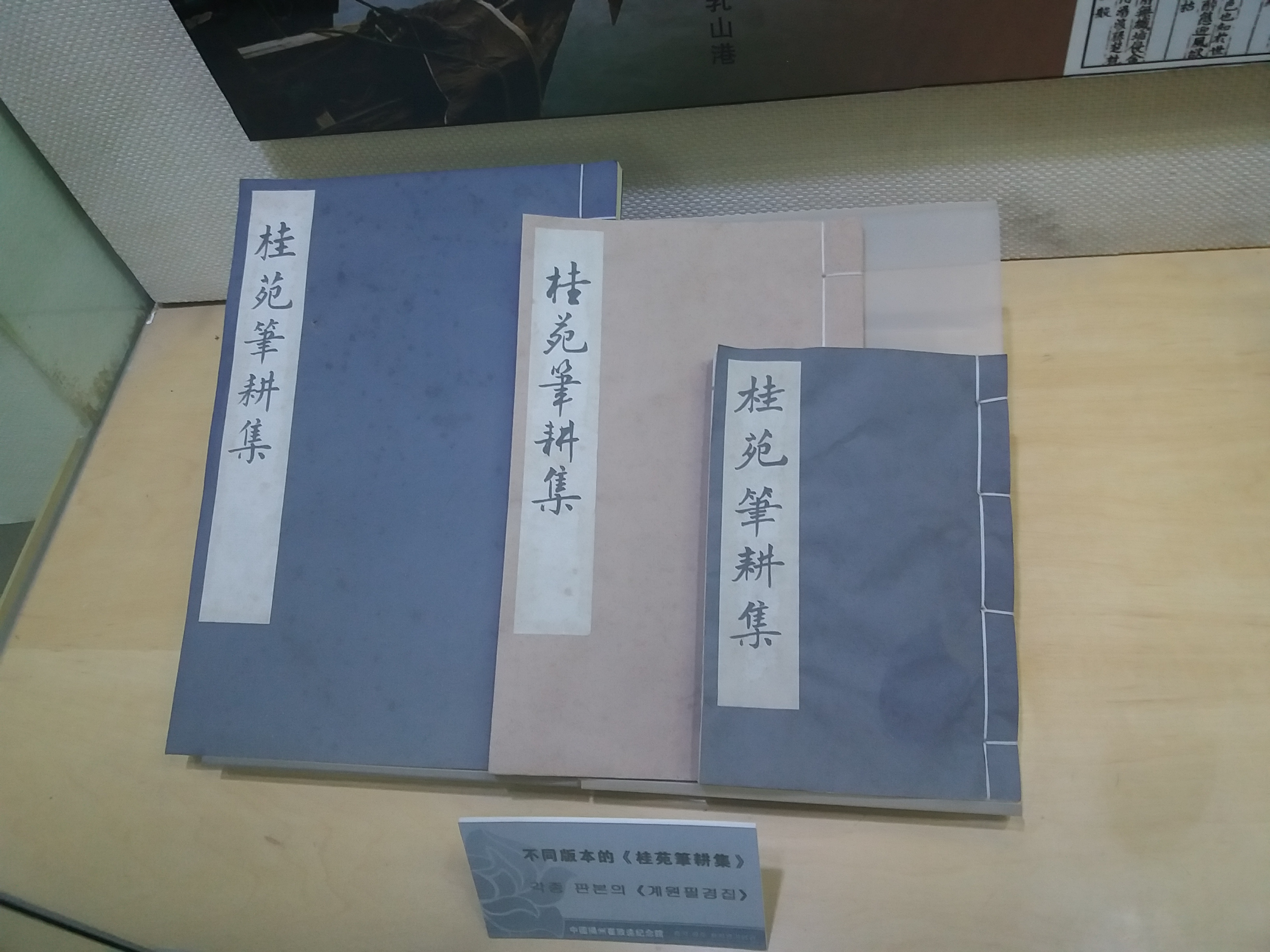 崔致远纪念堂二层展厅展示的《桂苑笔耕集》